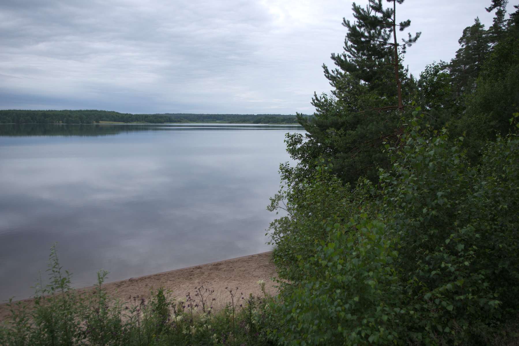 Sörsjön, Surahammars kommun